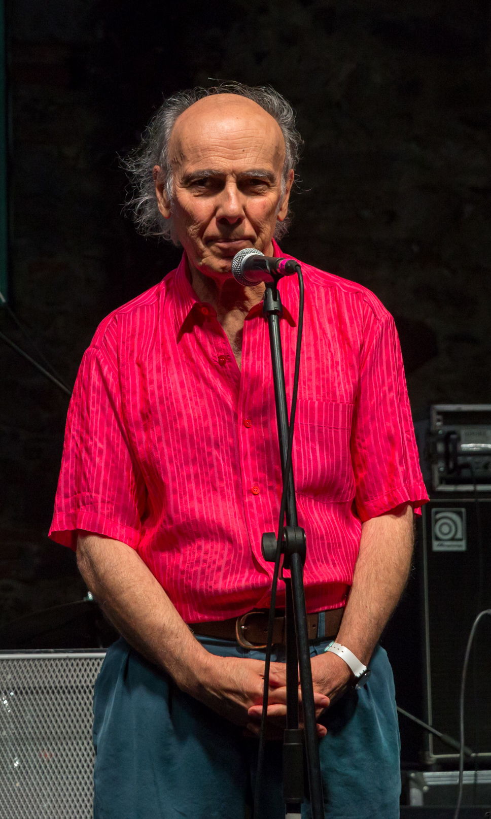 Caz müzisyeni